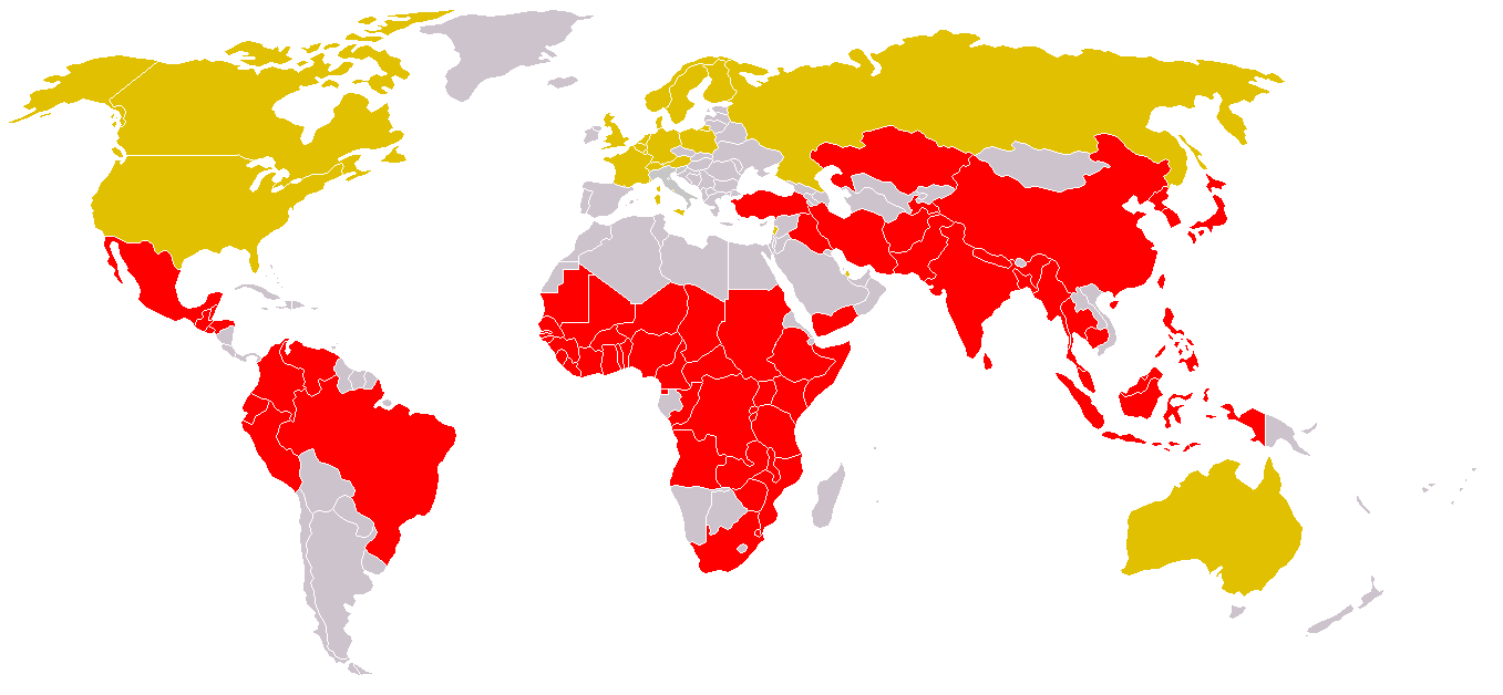 Pays concernés par la cholera